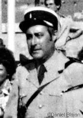 L'acteur Guy Grosso lors du tournage Le Gendarme et les Extra-terrestres en 1978, à Saint Tropez.